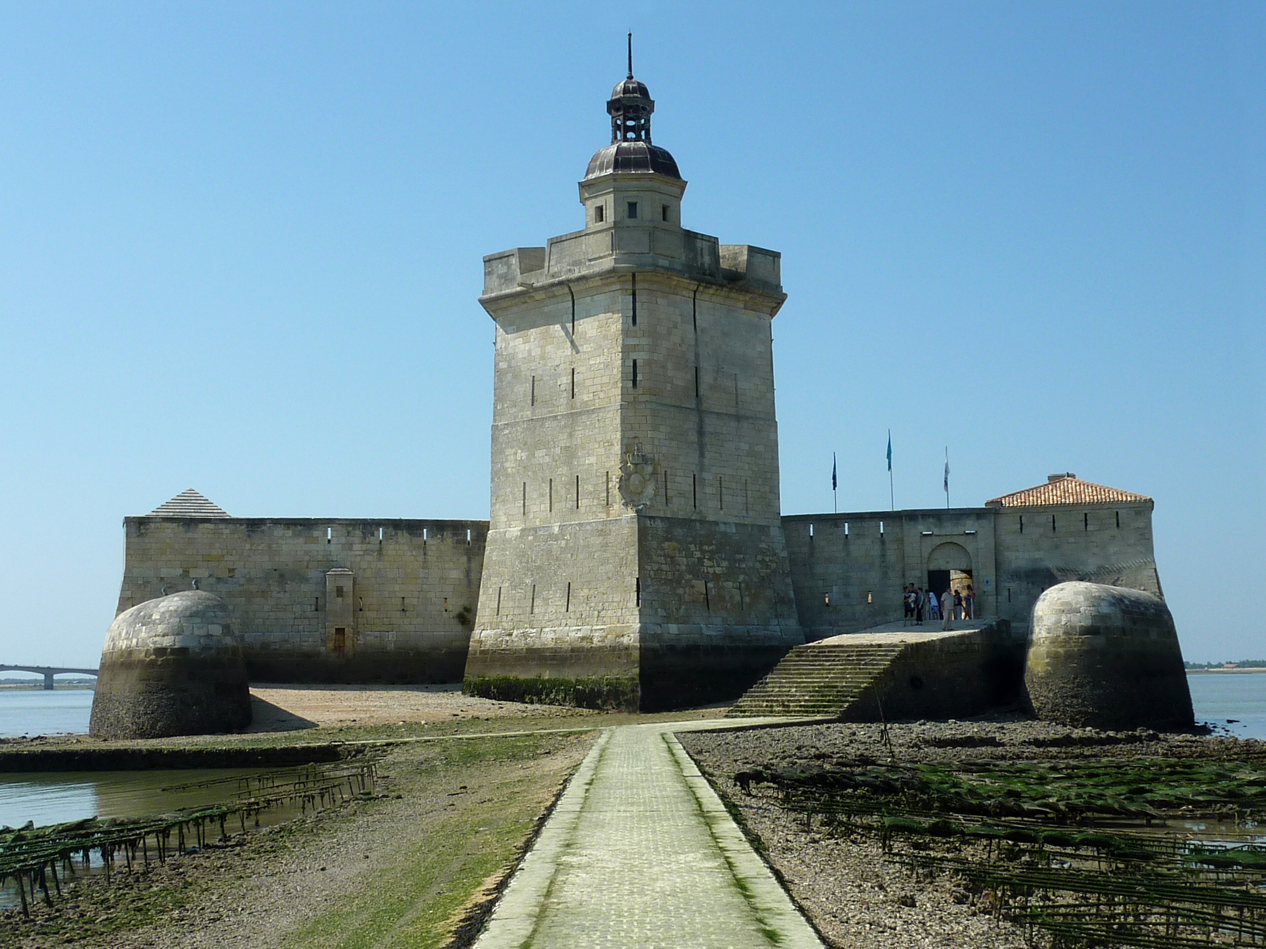 Le Fort Louvois vu de la passe à marais basse .